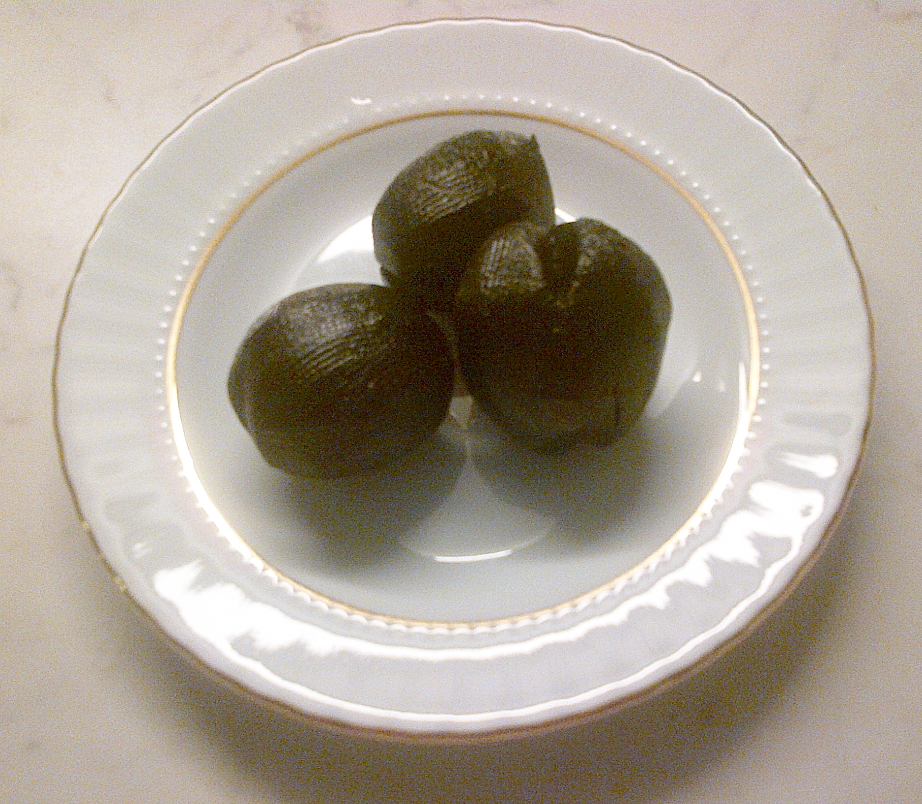 Dulce de nuez fresca (verde) de la cocina turca.